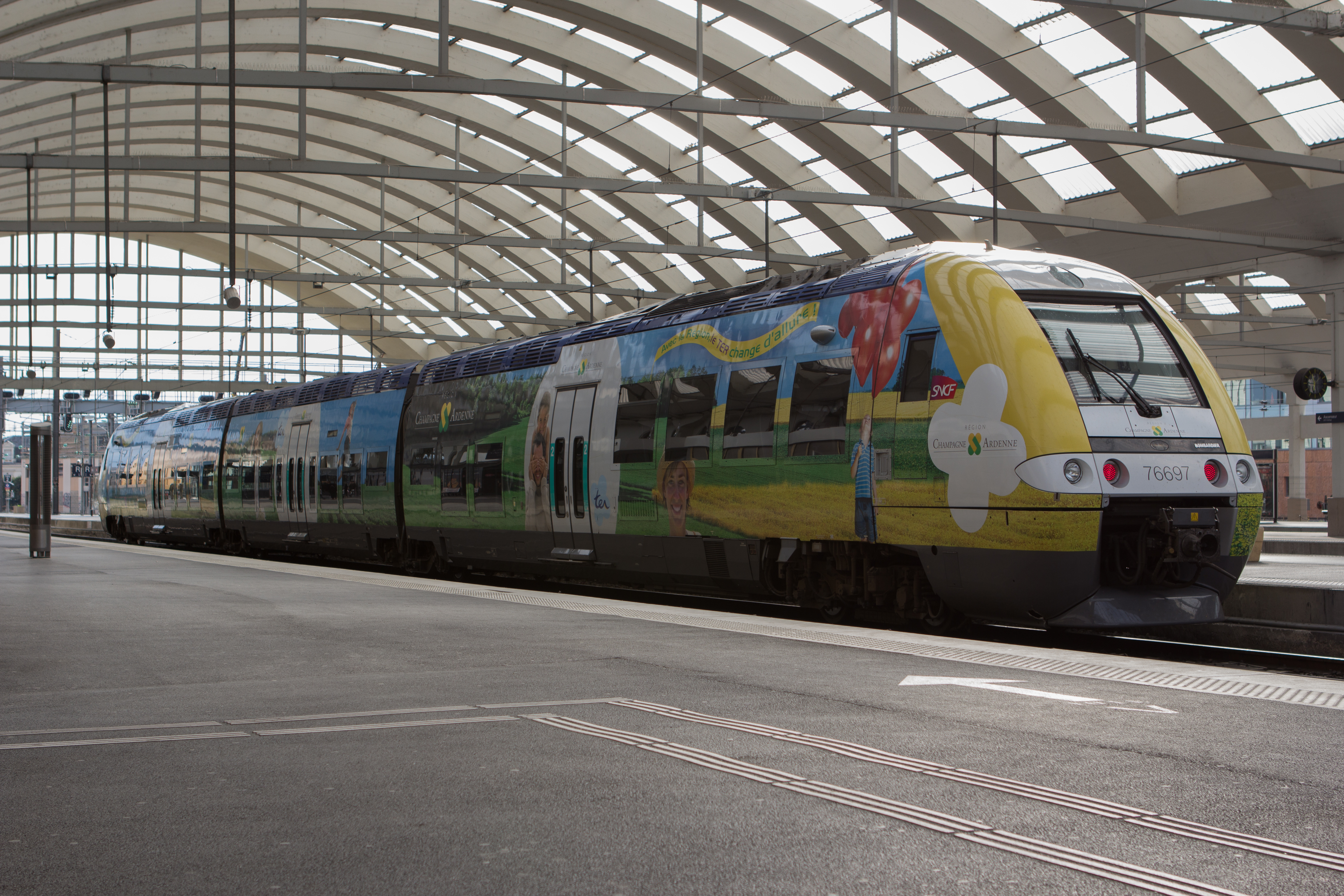 Trains TER Champagne-Ardenne dans la gare de Reims / Reims, Marne, France